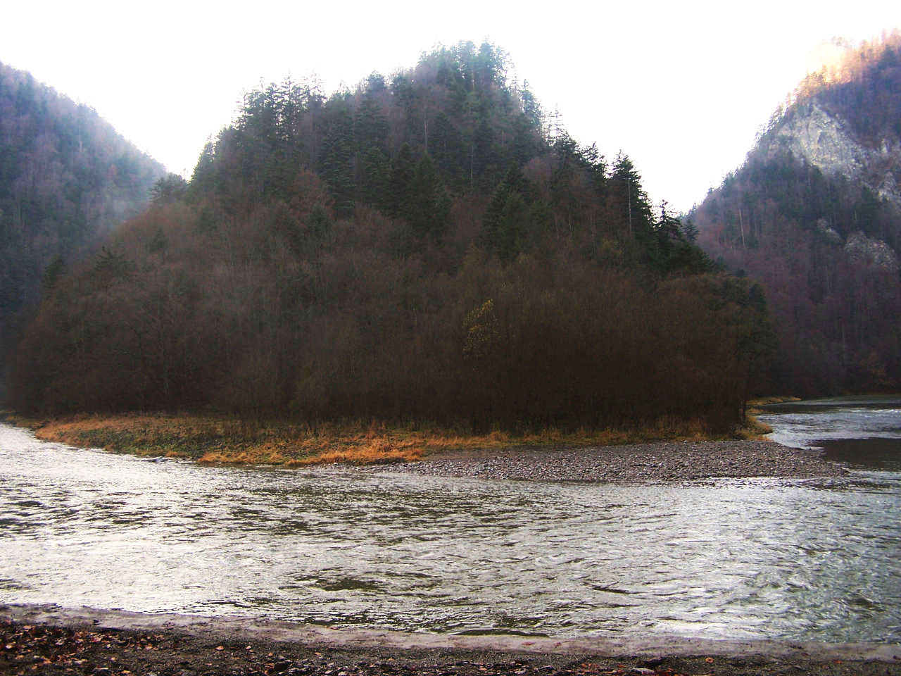 Przechodni Wierch (Pieniny)